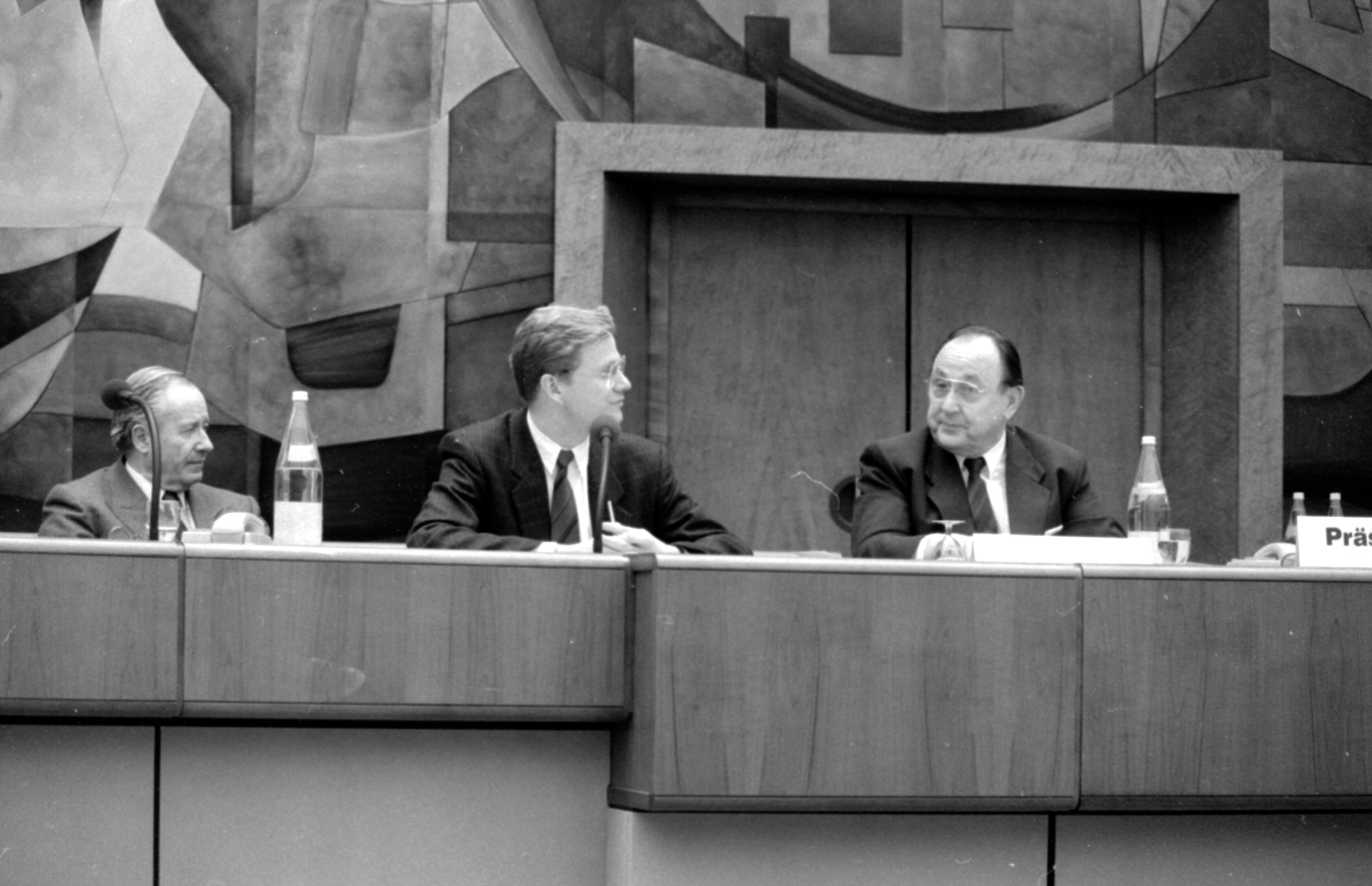 14. Bundeskongress der Jungen Liberalen vom 25.-27. November 1988 in Luxemburg